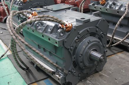 Тяговый электродвигатель ДТК-417К